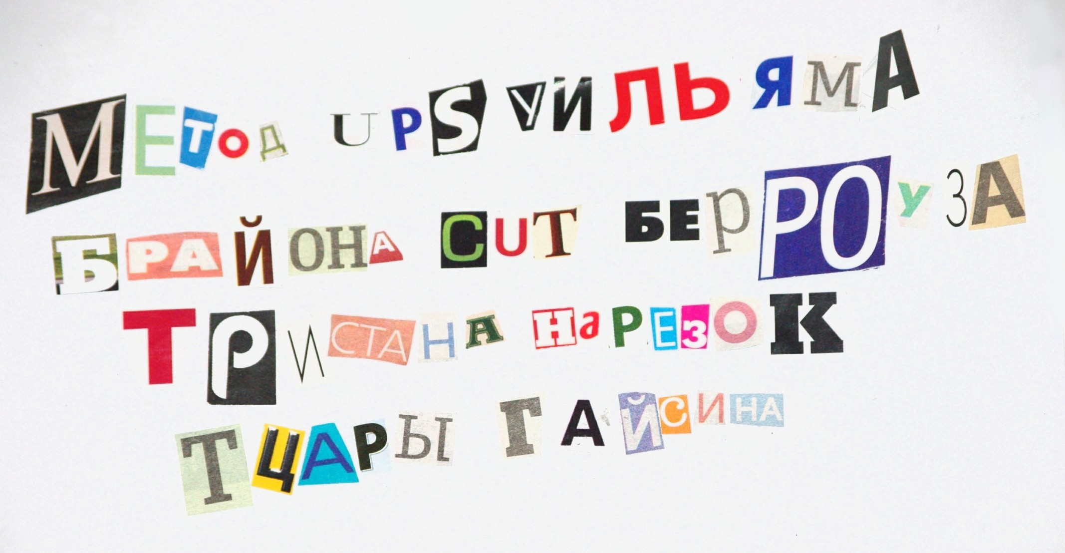 Иллюстрирующее компоновку текста по «методу нарезок» (cut-up) изображение.